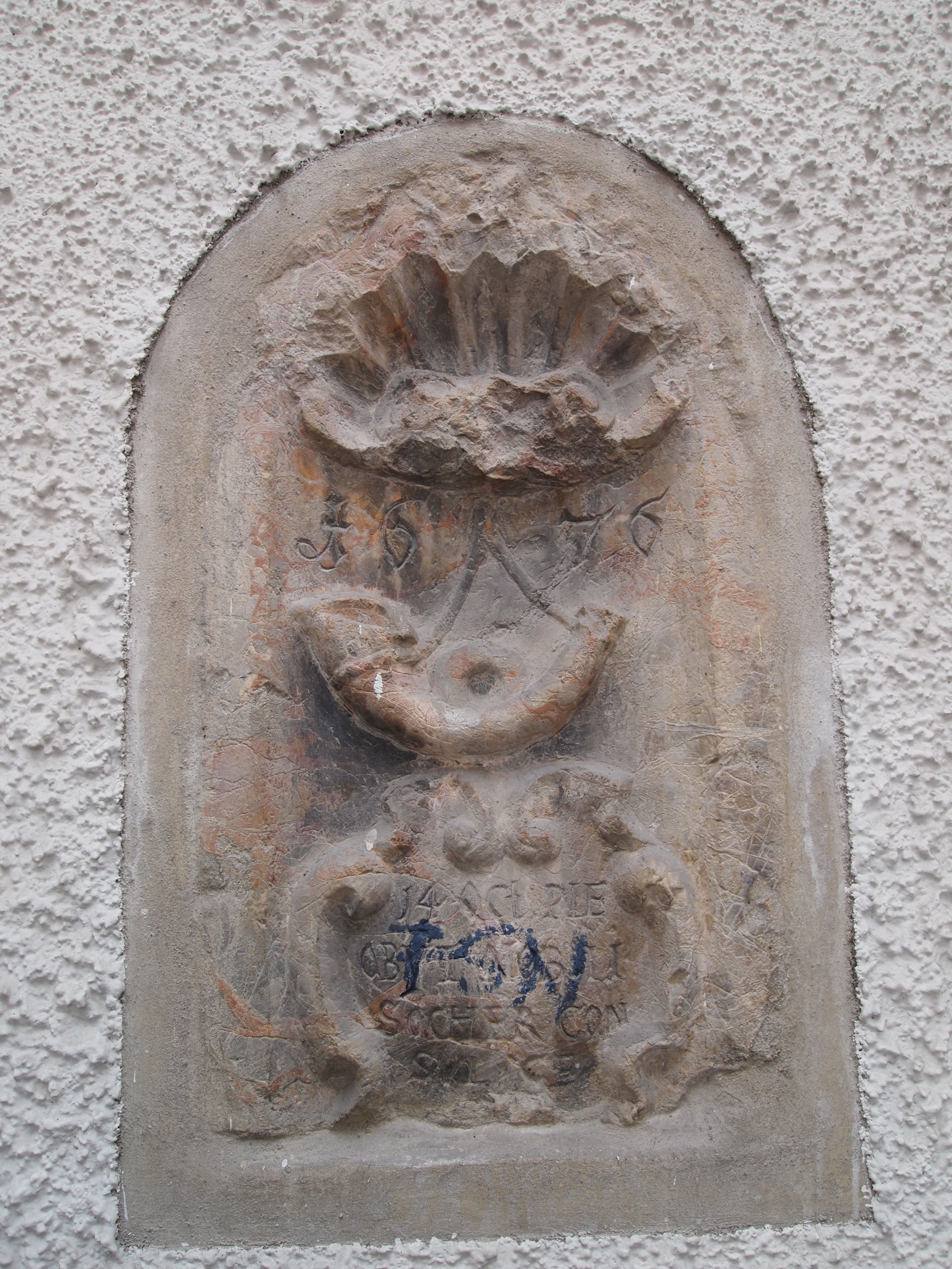 Füssen, Bahnhofstrasse 10 (Post): Grabstein in der Wand am Eingang, ehemals an der Filialkirche Unserer Lieben Frau am Berg (Füssen)